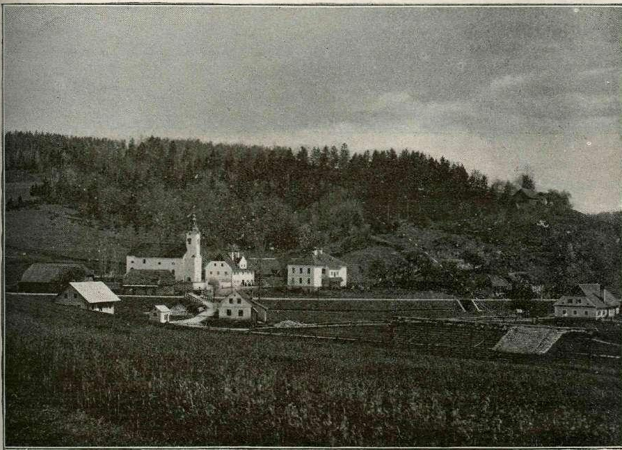 Št. Lovrenc ob Temenici.